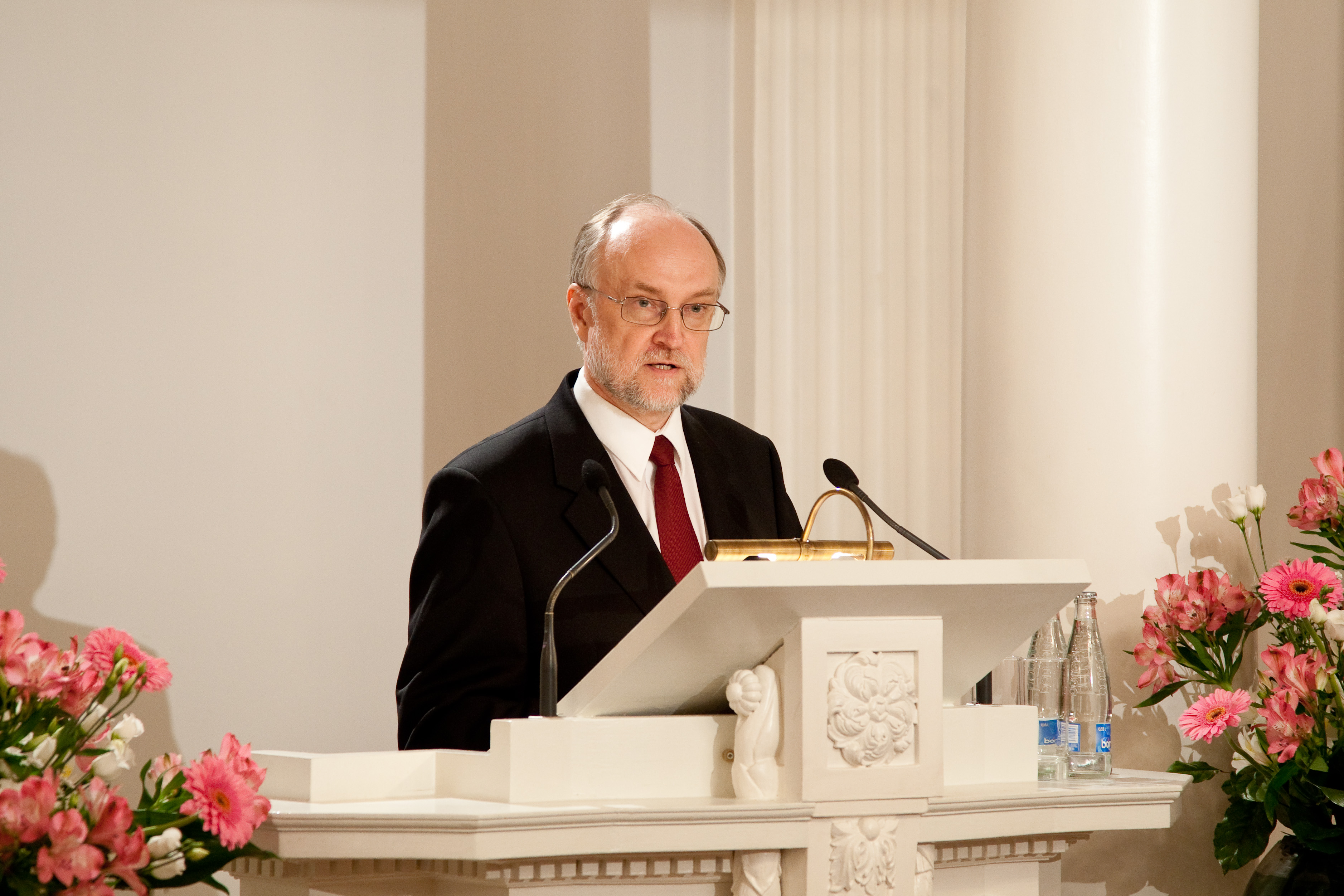 Tartu Ülikooli kehakultuuriteaduskonna lõpuaktus TÜ aulas 21. juunil 2010. Pildil TÜ kehakultuuriteaduskonna dekaan prof Mati Pääsuke.